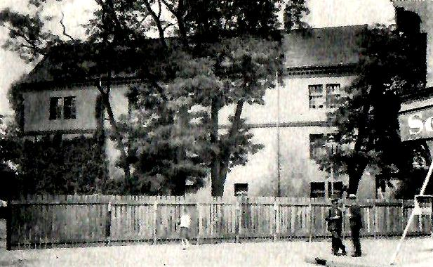 Erbaut im späten 14. Jahrhundert als Moritzkirche, ab 1806 militärisch genutzt, ab 1837 Mannschaftsquartier, 1920 abgerissen, Quelle: Hans-Herbert Möller: Die ehemalige Moritzkirche in Spandau. In: Jahrbuch für brandenburgische Landesgeschichte. 15. Band, Berlin 1962, S. 59–70, hier S. 68